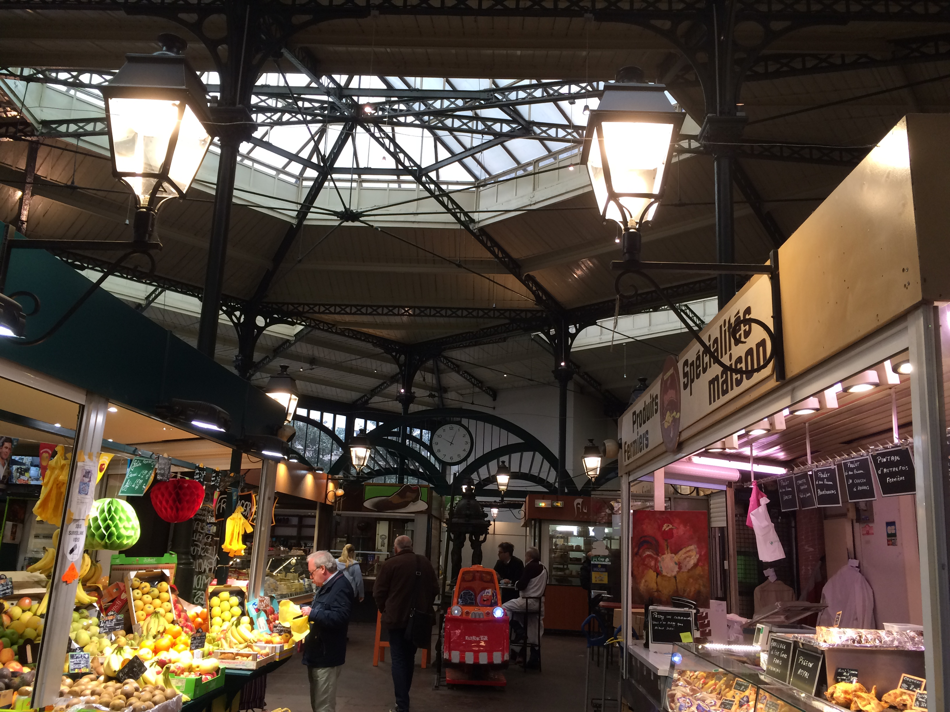 Vue intérieure du Marché Saint-Quentin à Paris en octobre 2016